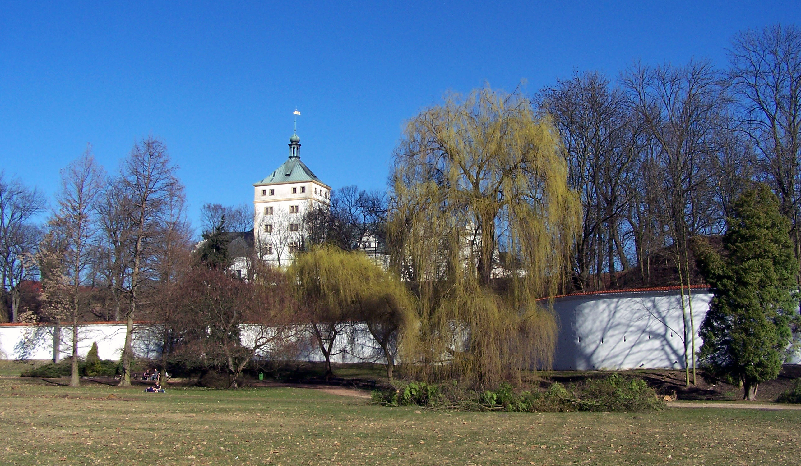 Tyršovy sady, pohled na zámek. GPS: 50°2'26.932"N, 15°46'25.920"E